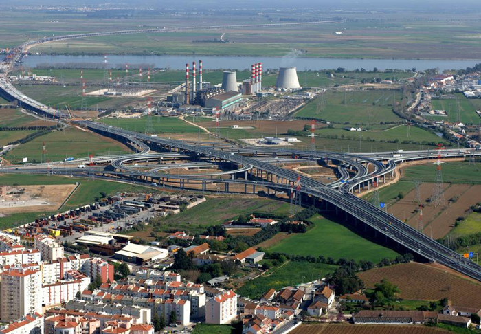 no do carregado, obra da edifer